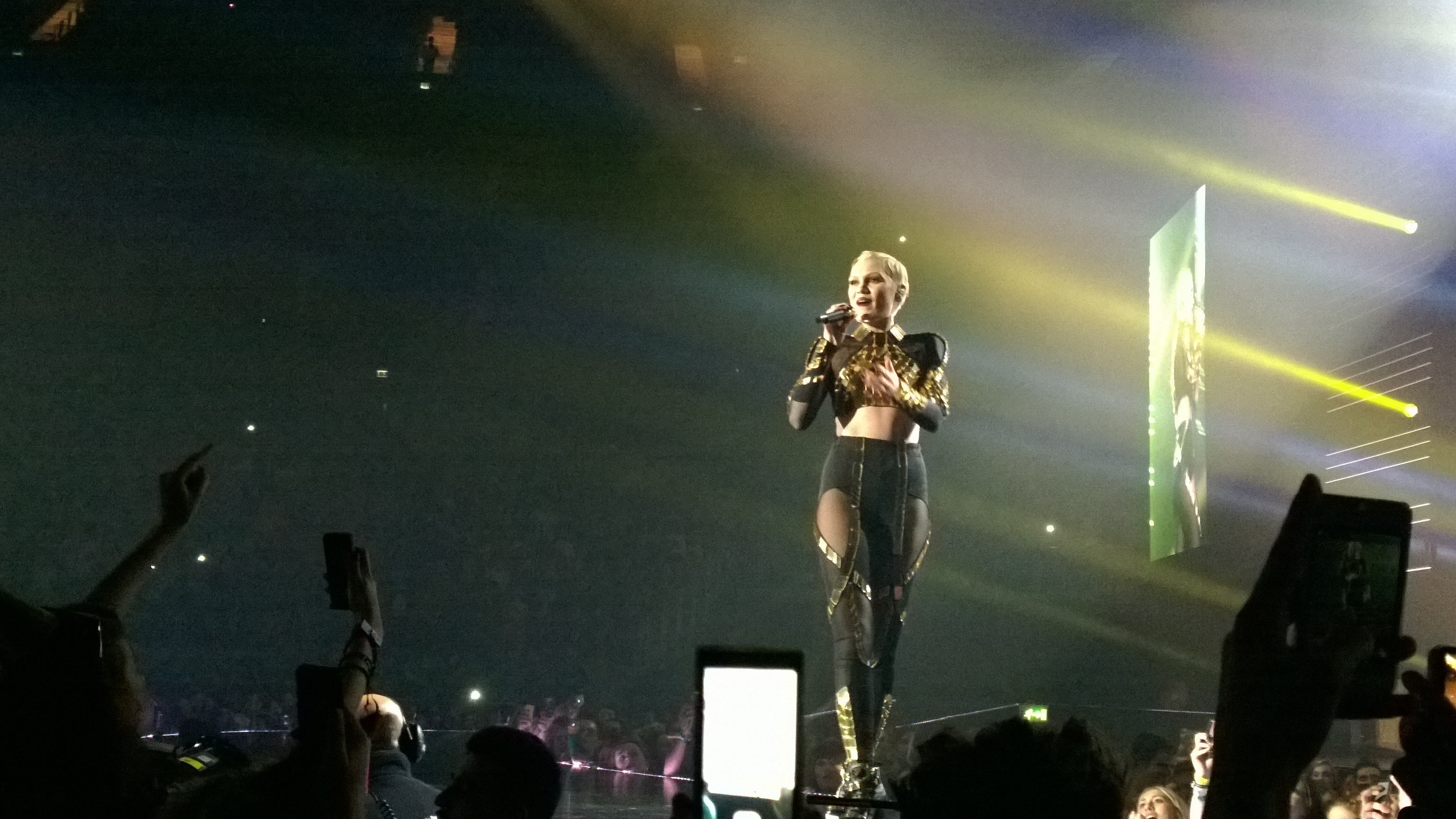 Jessie J, O2 Arena, Greenwich, London